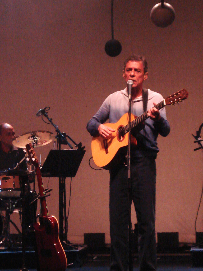 Chico Buarque at Porto Alegre, Brazil, March 2007